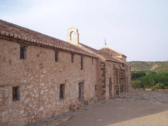 Ermita de Villalgordo (El Ballestero, Albacete)